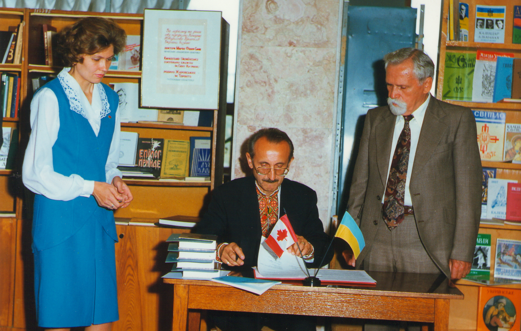 22 вересня 1999 р.урочисто відкрито Канадсько-український бібліотечний центр. На фото директор бібліотеки Фролова Т. І., Кузик І., Горлач С.